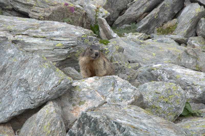 Alpenmurmeltier im Engadin